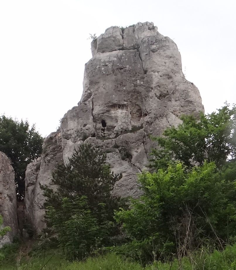 skała Locha w Grupie Knura w Łutowcu